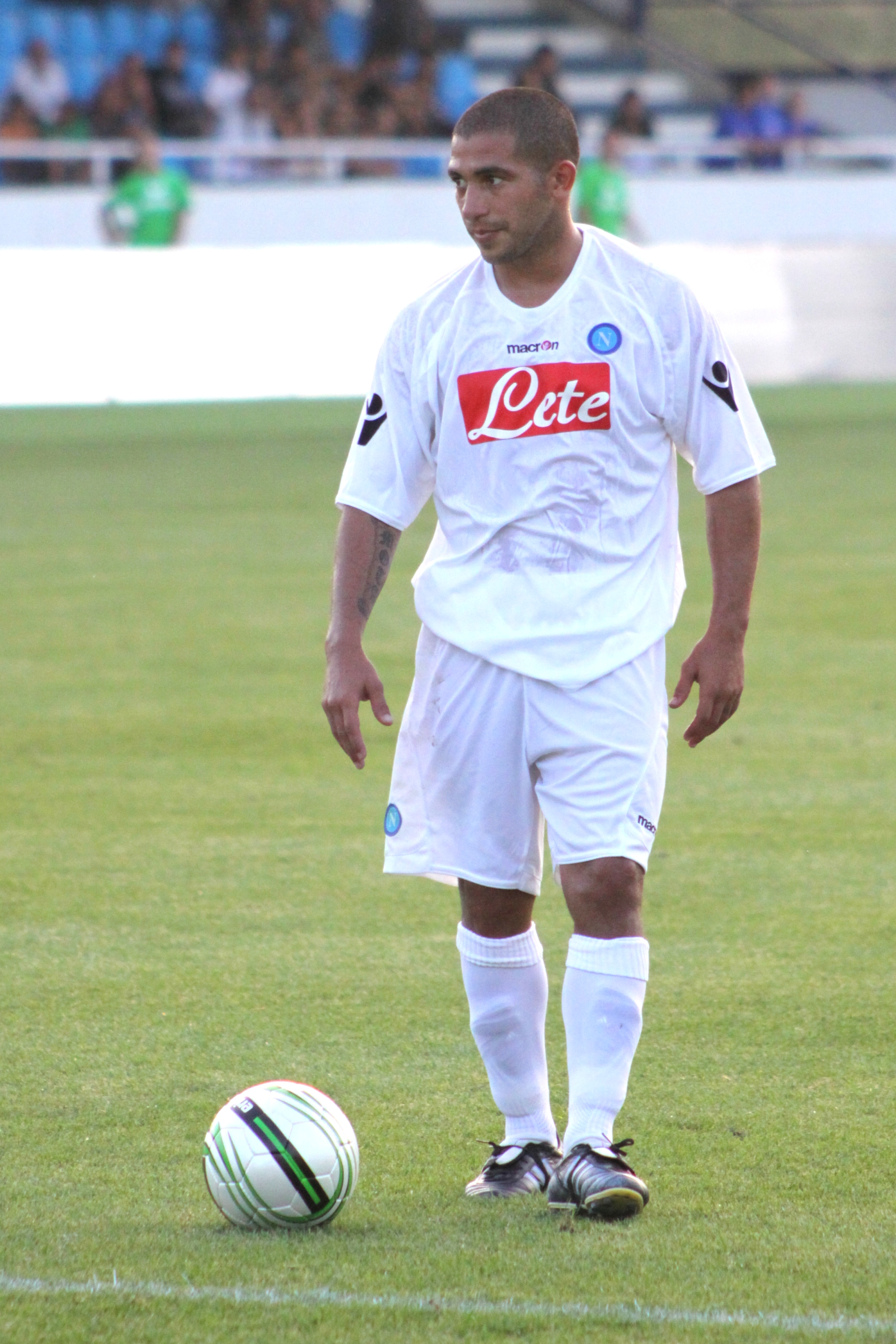 Walter Gargano - SSC Neapel (3) Walter Gargano - Società Sportiva Calcio Napoli